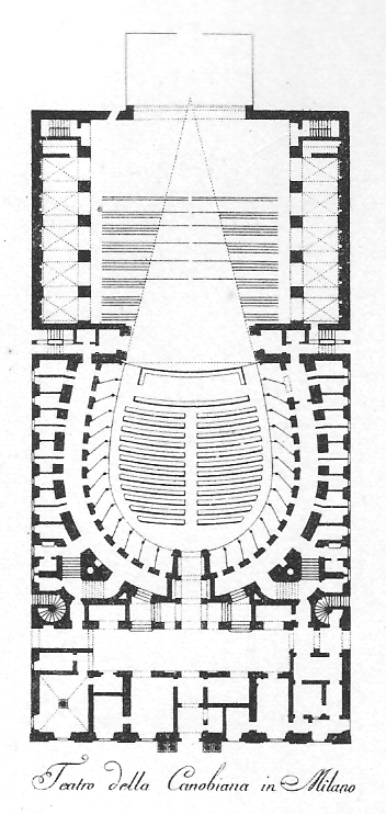 Pianta del Teatro della Canobbiana di Milano